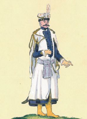 Adiutant koronny w polskim mundurze (generał adiutant króla w mundurze polskim)